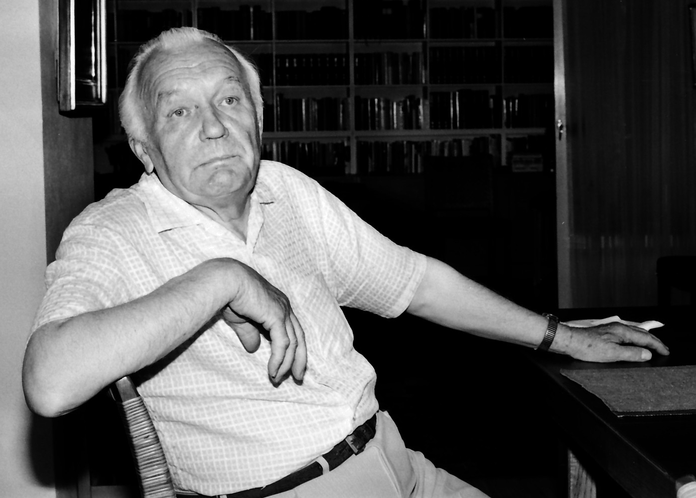 Sukselainen kotonaan Tapiolassa 11.6.1980